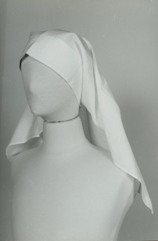 Voile d'infirmière en coton de la Salpétrière dans les anées 1950, Collection lignerie de la Salpétrière Conservé au musée de l'Assistance Publique - Hôpitaux de Paris depuis 1995